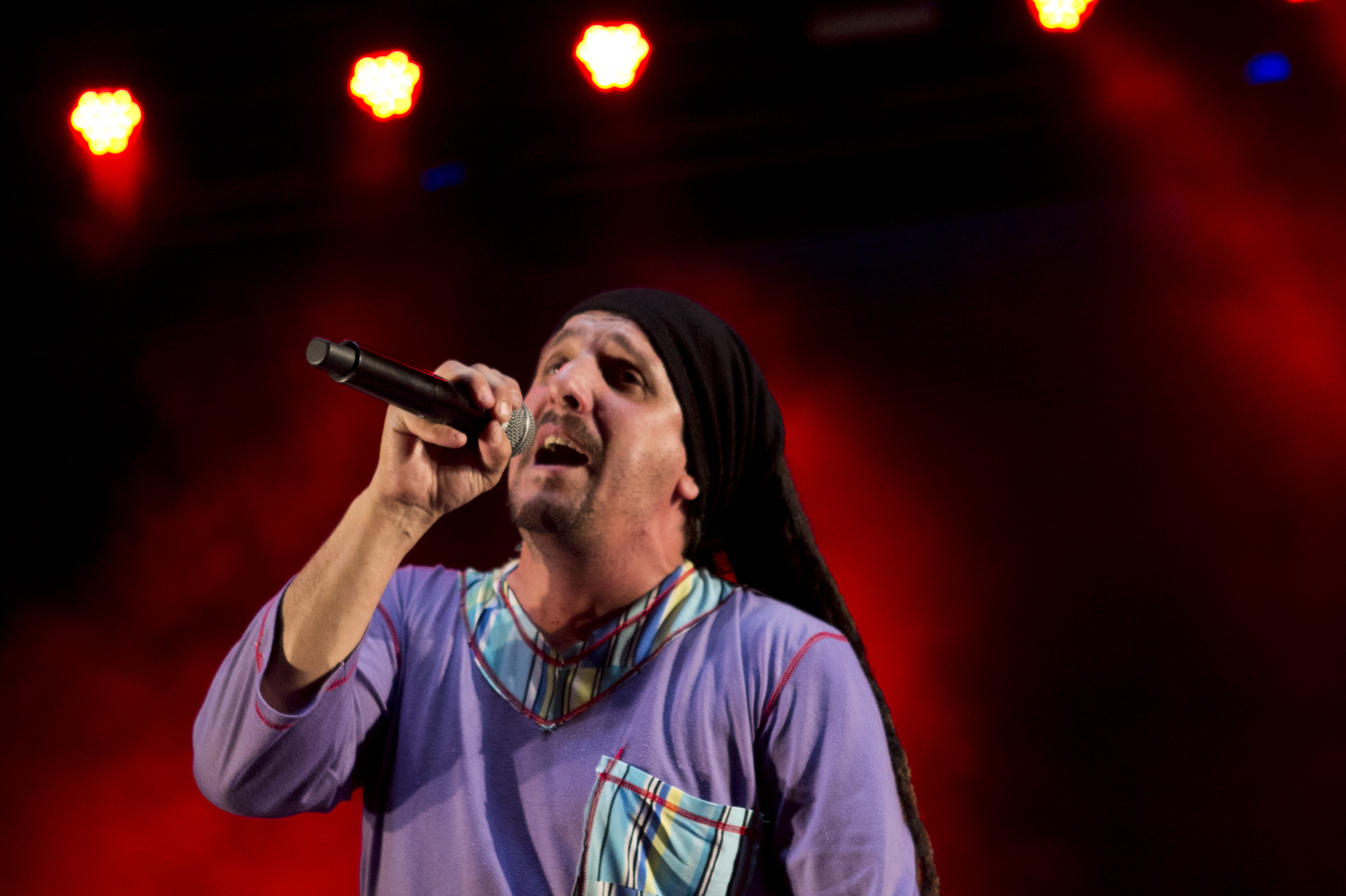 Germán Sbarbati en vivo (2015).